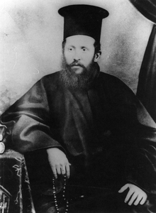 Dimitrios_Ikonomou